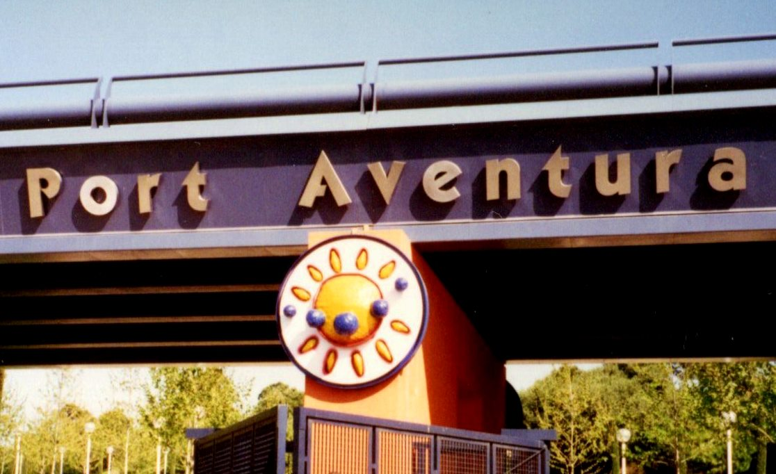 PortaventuraEntreeParking